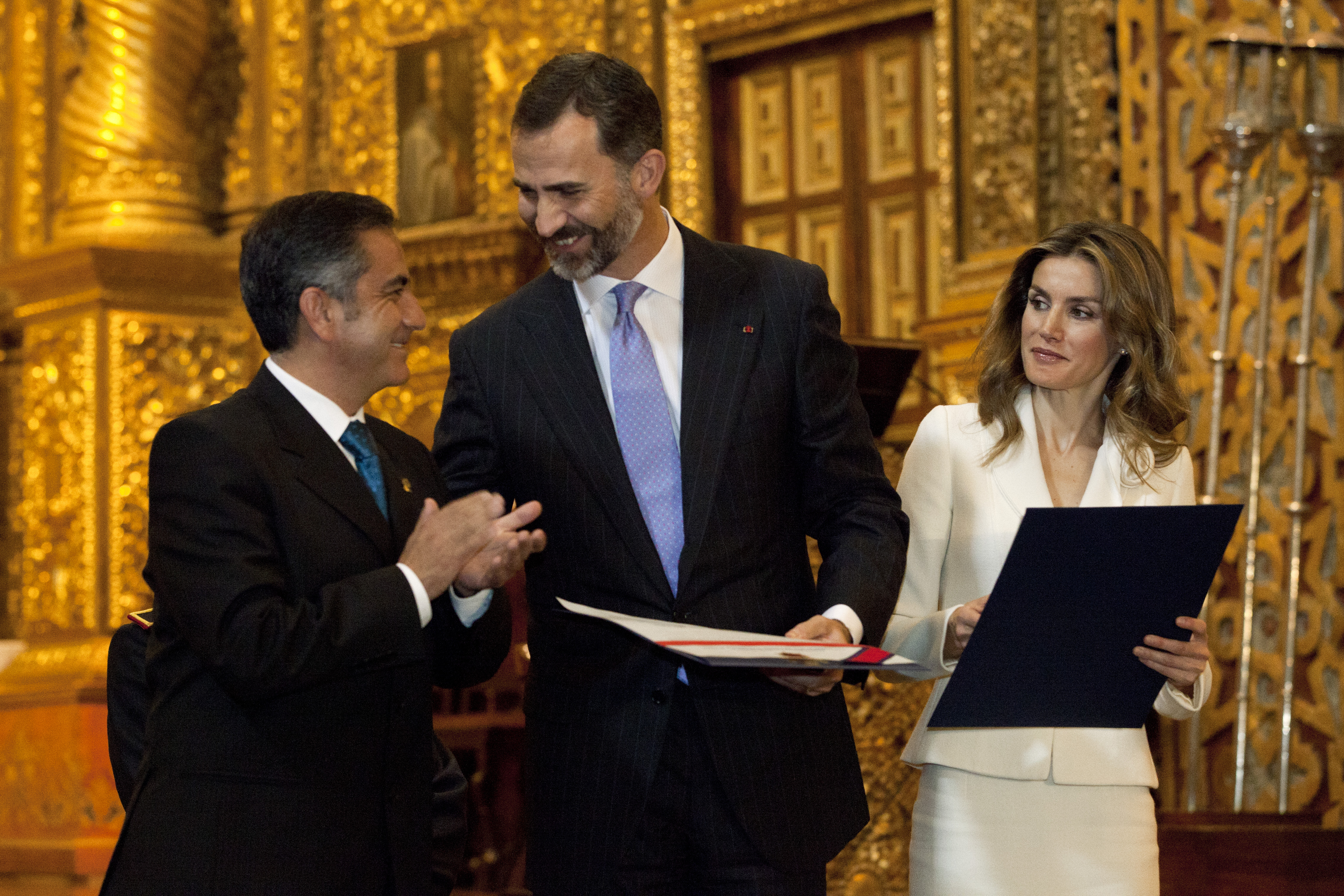 Quito (Ecuador), 5 de octubre 2012. El Príncipe Felipe de Borbón y la Princesa Letizia visitaron la Iglesia La Companía de Jesús, donde les recibió el Alcalde de Quito, Augusto Barrera. Posteriormente se trasladaron a Carondelet, donde fueron recibidos por el Canciller Ricardo Patiño y el Presidente Rafael Correa. Foto: Fernanda LeMarie - Ministerio de Relaciones Exteriores, Comercio e Integración.